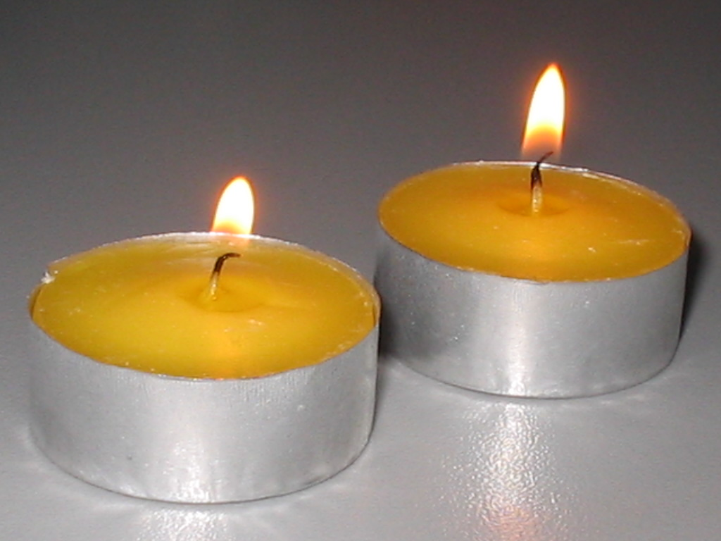 waxinelichtjes Categorie:Wikipedia:Afbeeldingen/Gebruiker:Michiel1972